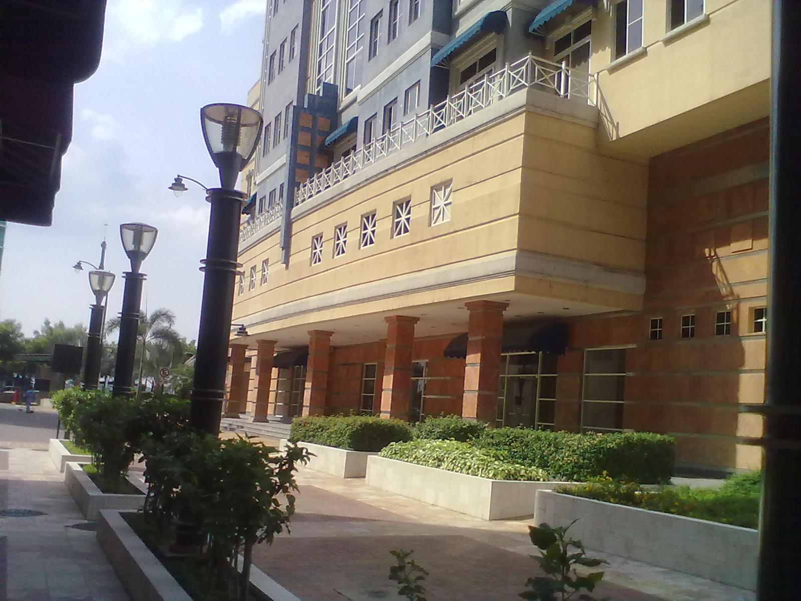 Puerto Santa Ana - Callejones. Foto por Sageo Villacrés.